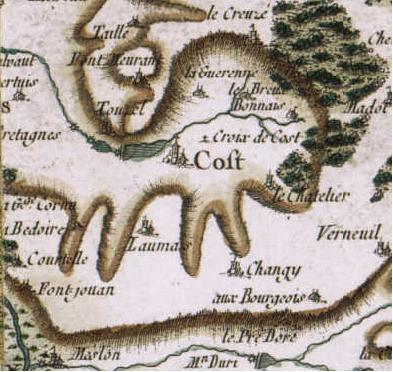 extrait de la carte de Cassini